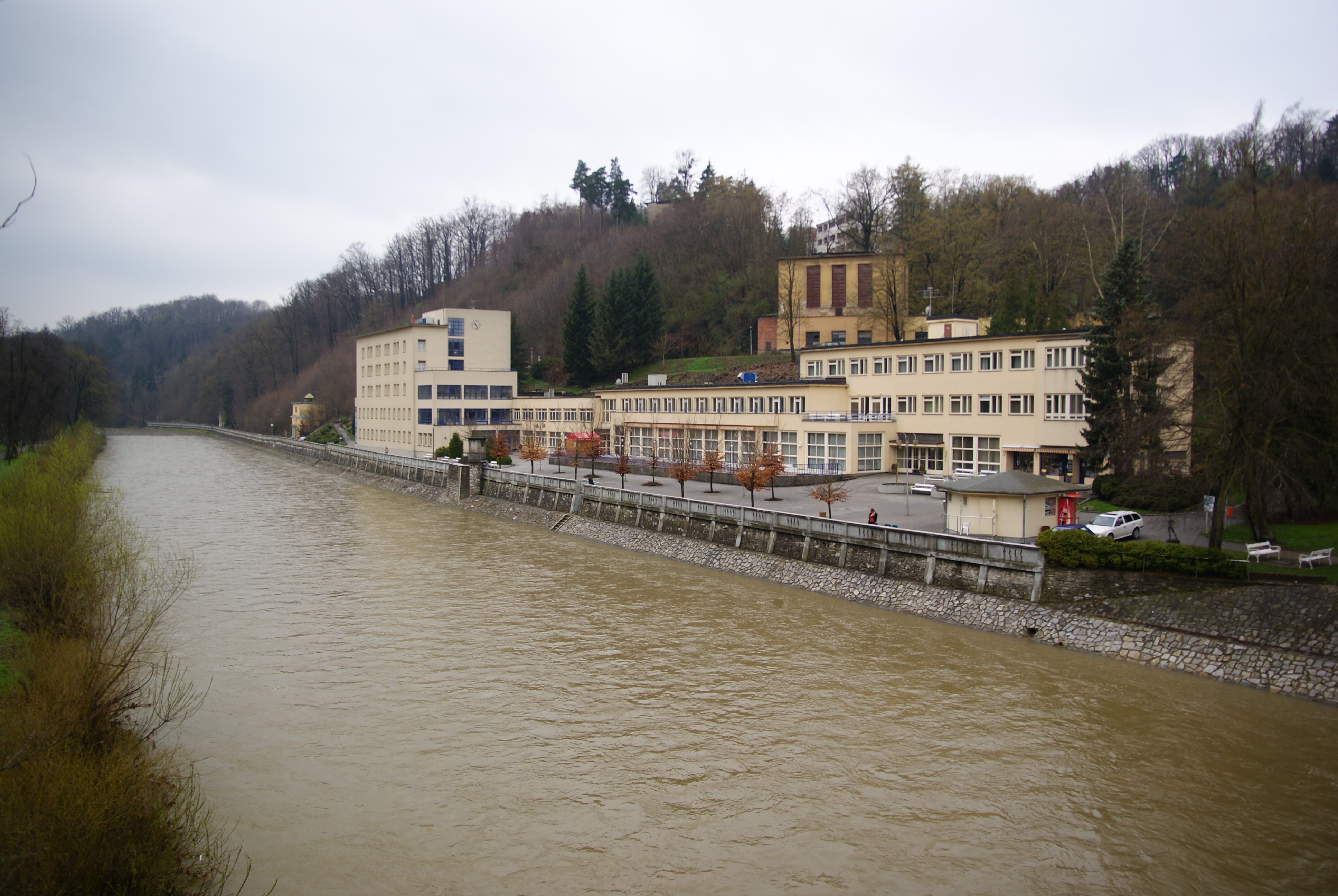 Lázeňský dům hotel a restaurace (Teplice nad Bečvou), vedle lázeňského domu Bečva 24, Teplice nad Bečvou